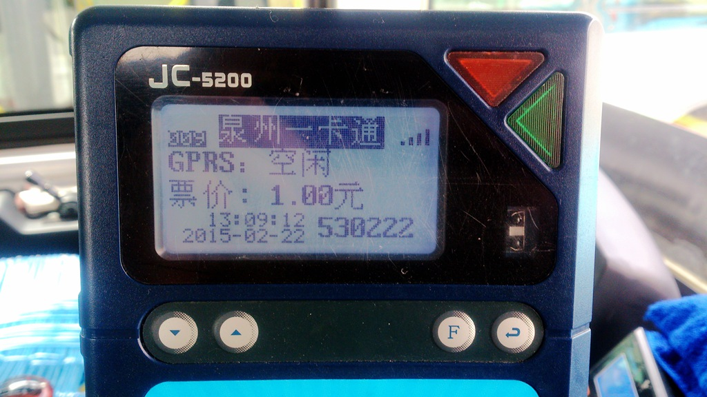 雄帝JC-5200型刷卡机液晶屏幕